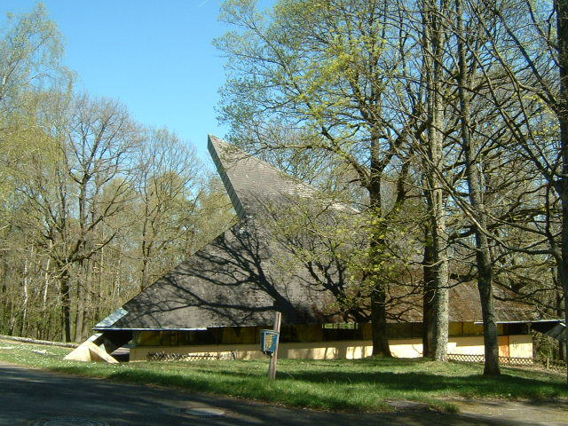 Das Kinderdorf Wegscheide ist das Schullandheim der Stadt Frankfurt am Main , im Bereich der Stadt Bad Orb. Dort wird auch Unterricht abgehalten. Hier: Disco UND Kirche.